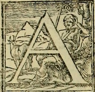 Lettrine A edition 1570 Venise I quattro libri dell'architectura